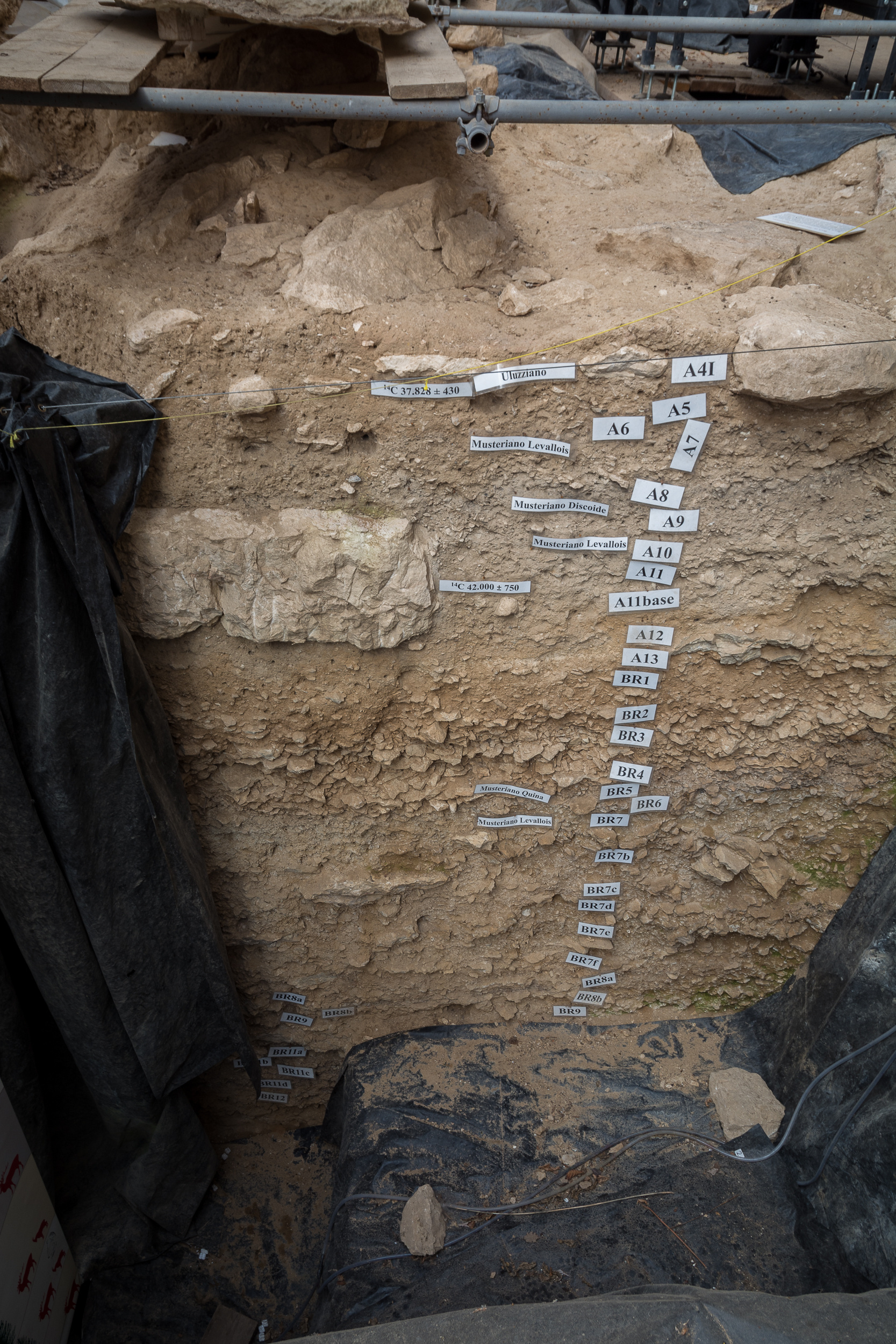 Profil mit Kennzeichnung der Straten im vorderen Bereich der Grotta di Fumane bei Verona in Venetien, Italien.